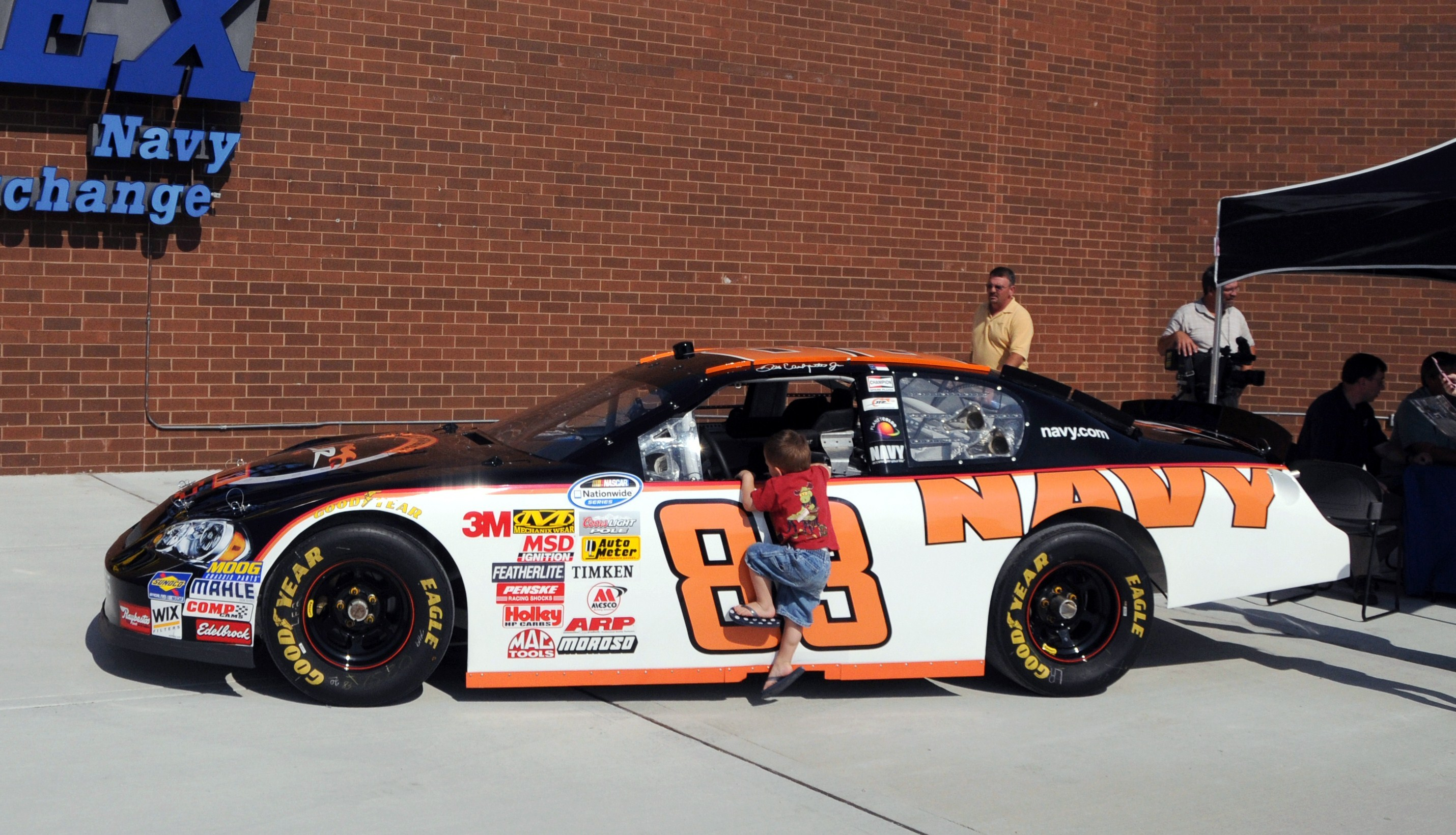 Dale Earnhardt juniors Nationwide Series-Wagen mit der Nummer 83